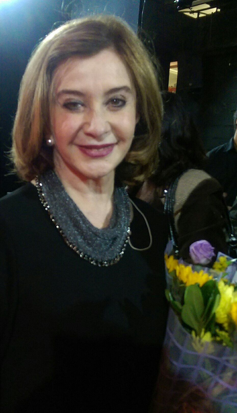 Sandra Sade, an Israeli actress, in Beer Sheva, 21.01.2017 סנדרה שדה, שחקנית ישראלית, ב"שבת-תיאטרון" בבאר שבע, 21.01.2017